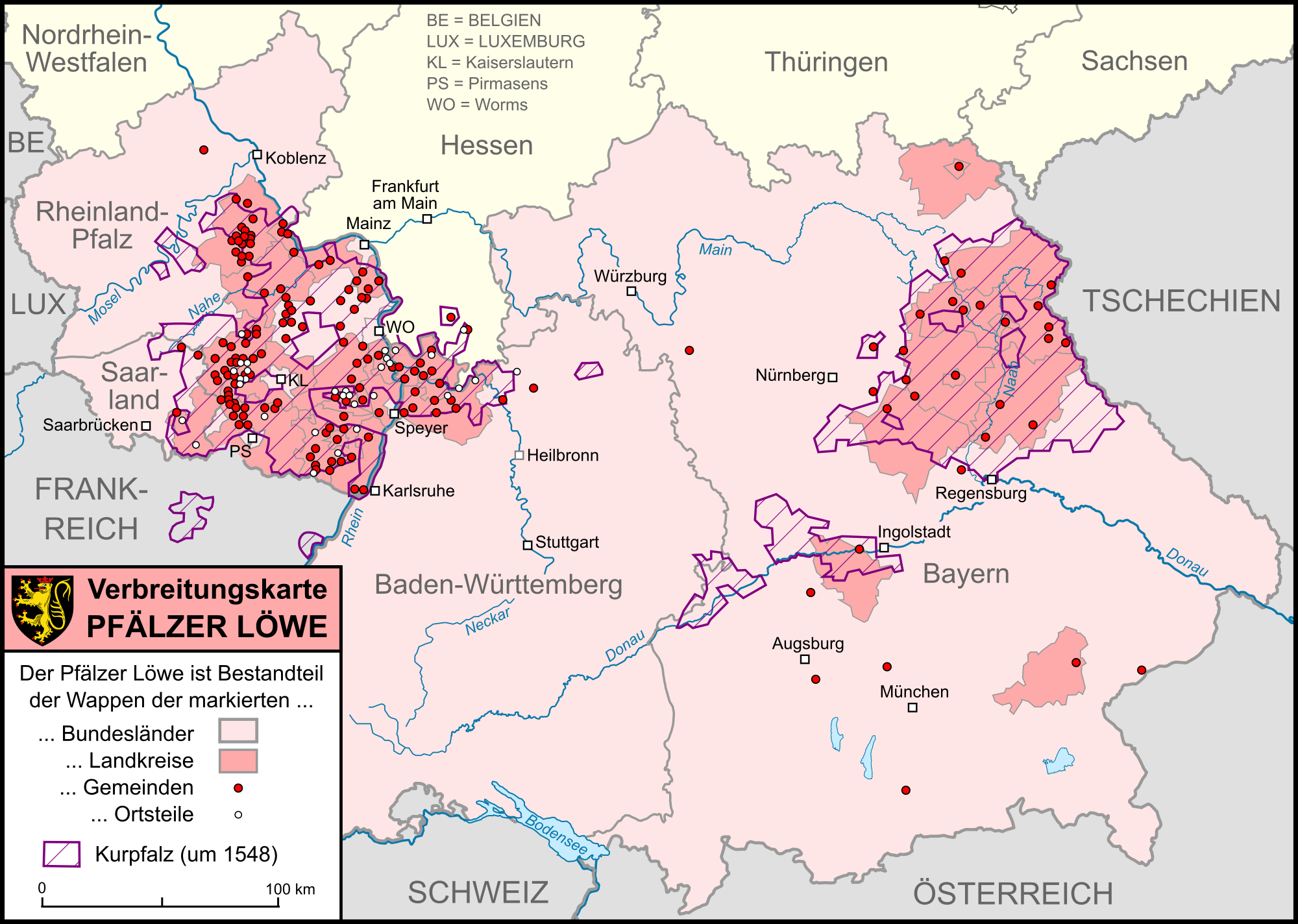 Bundesländer, Landkreise, Städte/Gemeinden und Stadtteile/Ortsteile mit dem Pfälzer Löwen im Wappen